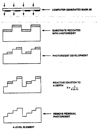 נניח שאנו מעוניינים בצבירת פאזה מסויימת, ניתן לקבוע את הסחת הפאזה ע"י סט מערכי של רמות - 2N (2 בחזקת N מסכות) רמות דסקרטיות. תהליך היצור הומצאה בארה"ב. ברגע שהיא יצאה אל הפועל היא שימוש באלמנטים אופטים דיפרקטיביים (המשתמשים באפקט הדיפרקציה). השיטה זולה מאוד וקל לשכפל רכיבים בדרך זו.